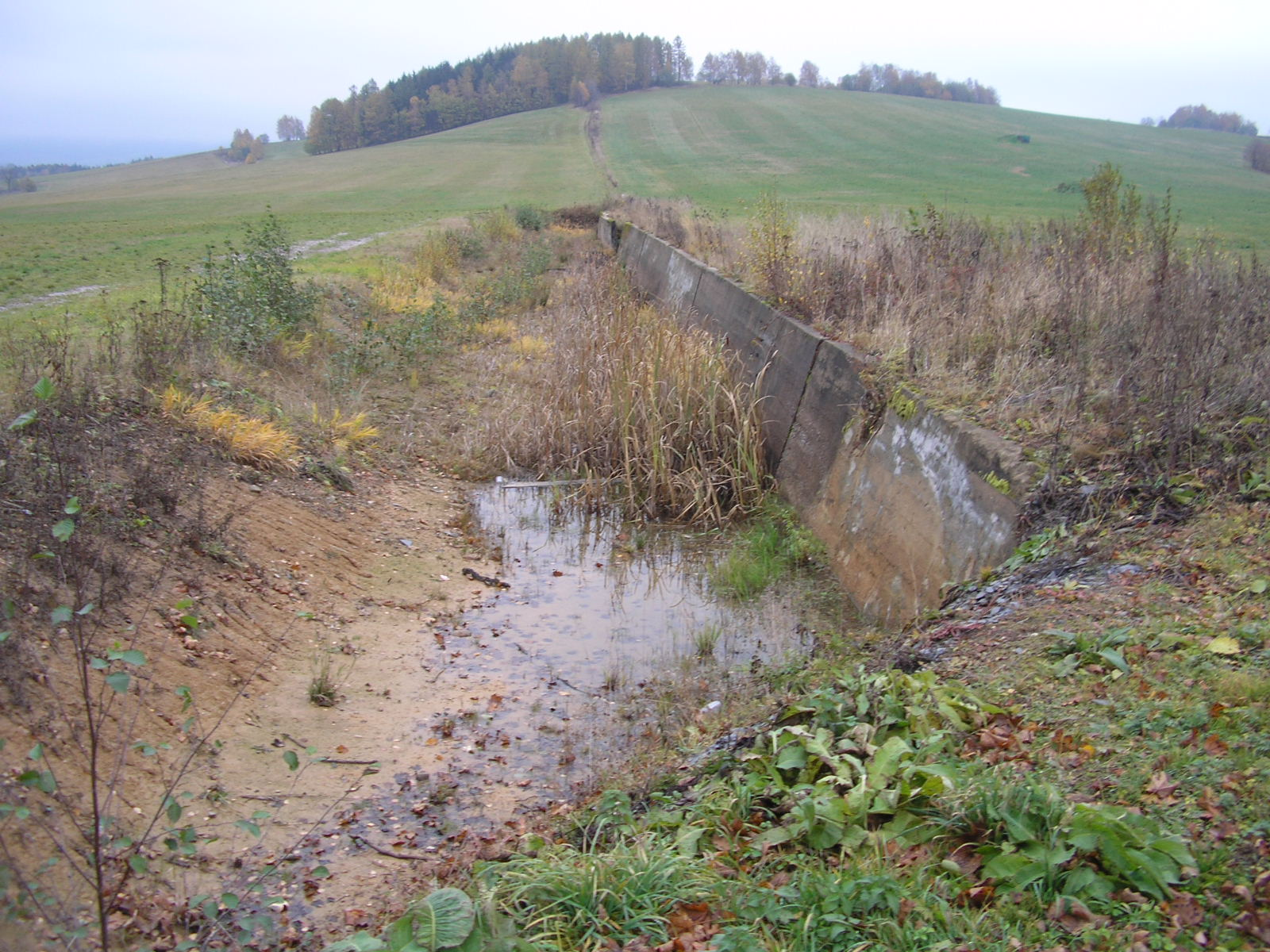 Protitankový příkop vedoucí od Pěchotního srubu K-S 14 U cihelny k tvrzi Hůrka